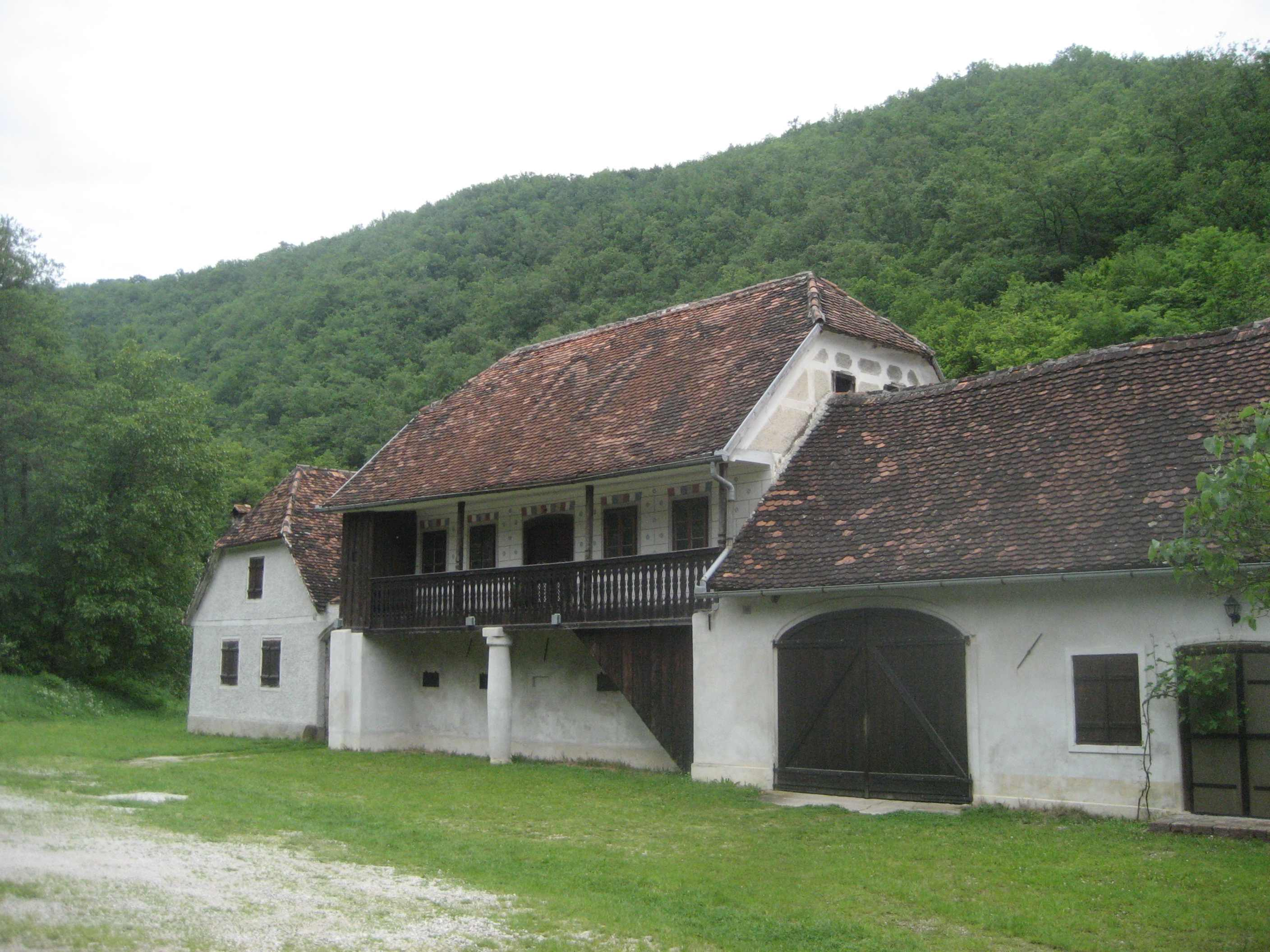 Medven Casle, Zumberak, Croatia